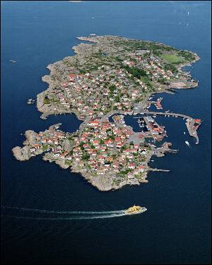 Flygfoto över Källö-Knippla.